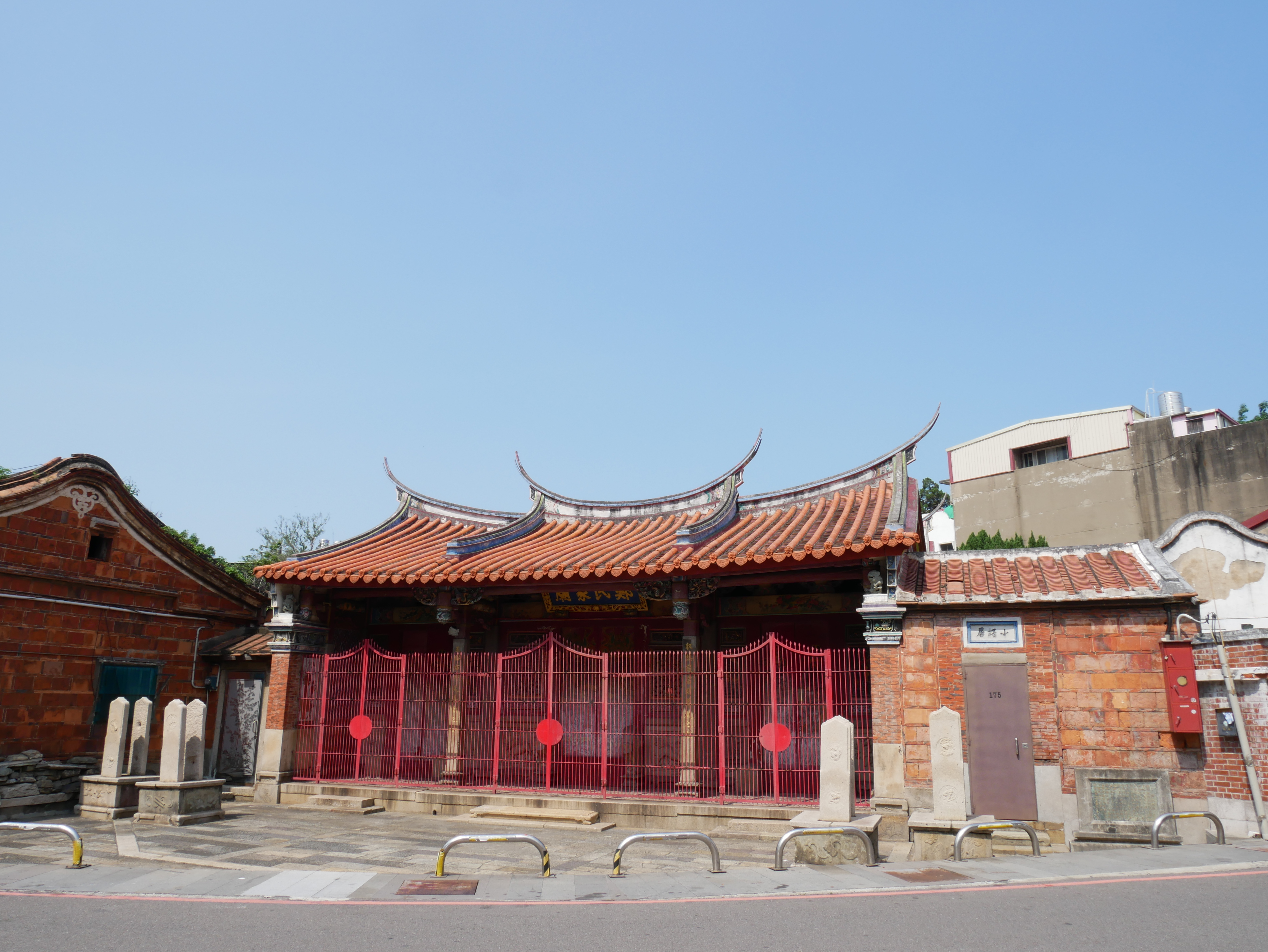 中文（台灣）: 新竹鄭氏家廟遠景，新竹市北區北門聯里北門里